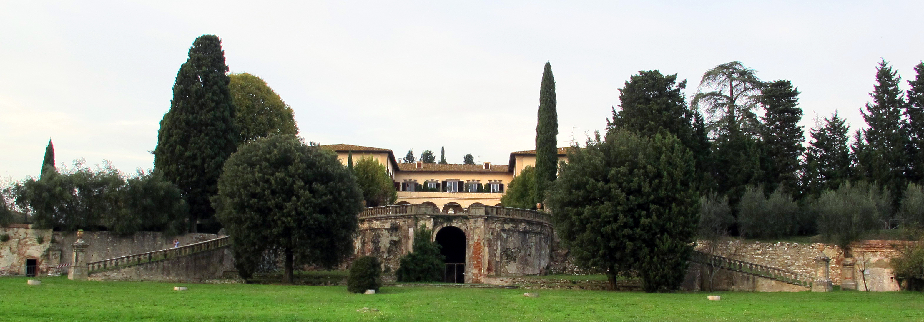 Villa di Lappeggi